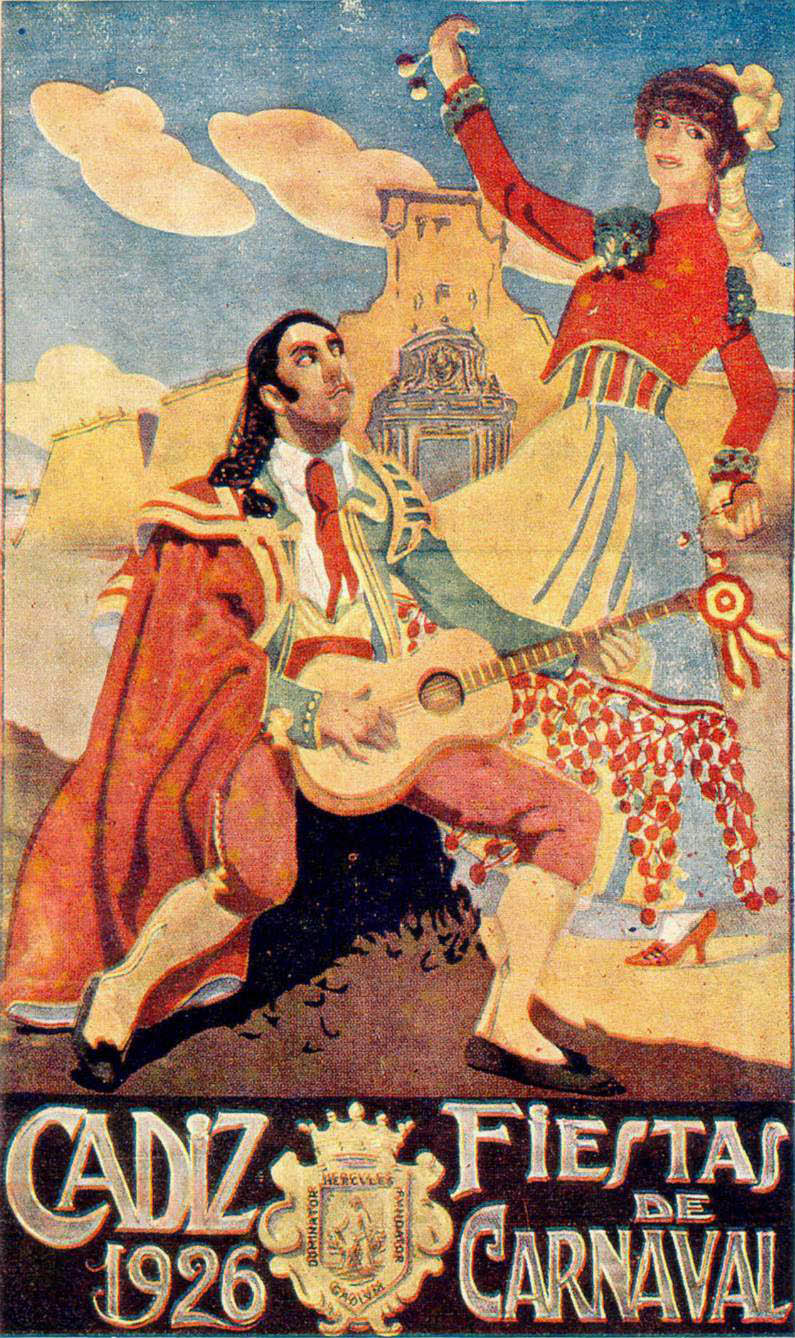 Cartel anunciador del carnaval de Cádiz de 1926